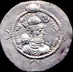 Pièce du règne de Khosro Ier